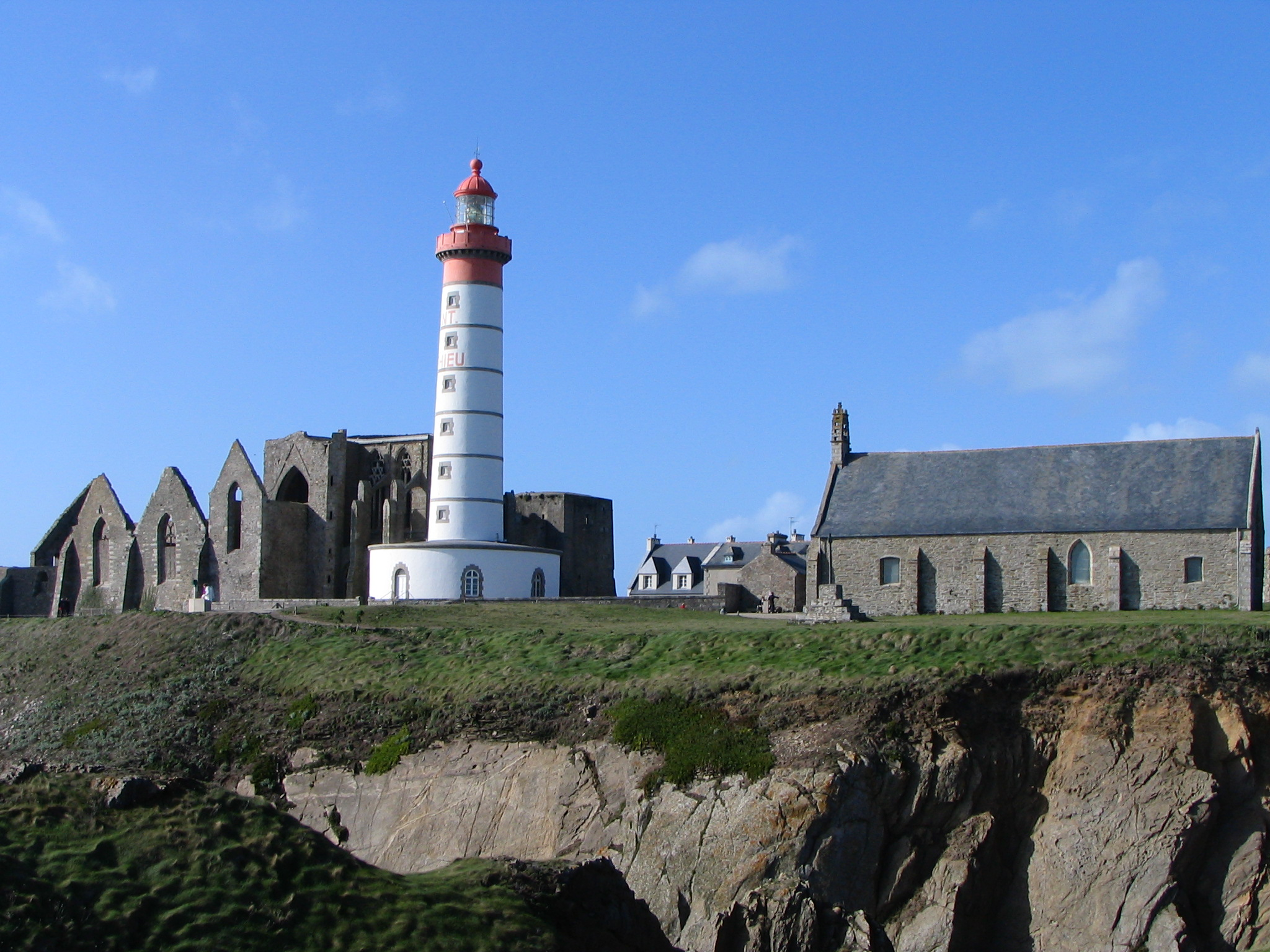 Les ruines de l'abbaye de Saint-Mathieu et le phare